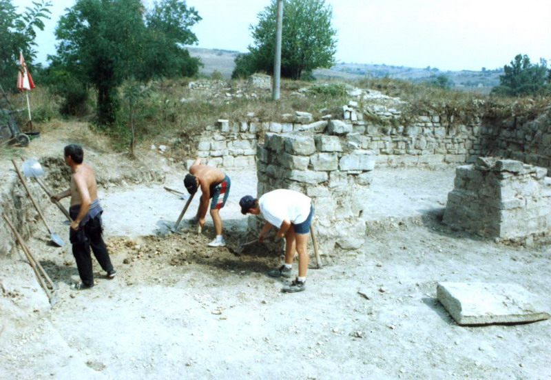 Крепостта "Ковачевско кале" при град Попово. Доразкопаване на Кула № 11 от Западната му порта.